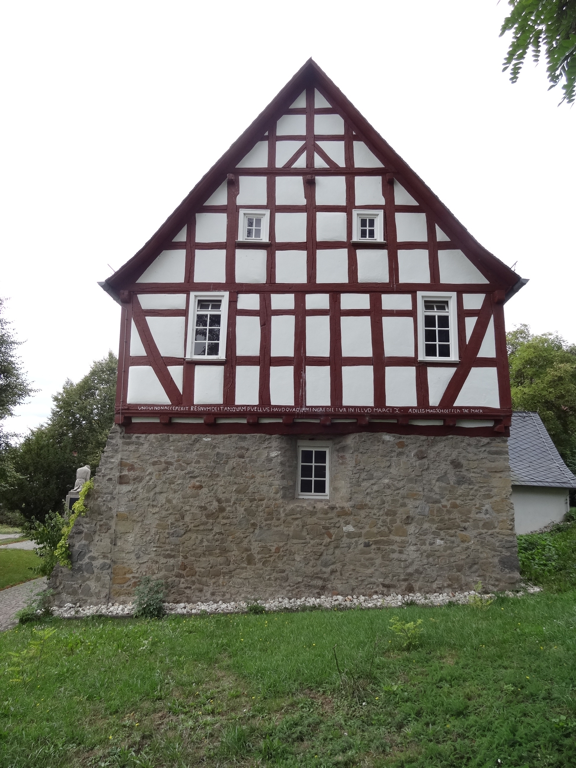 Evangelische Pfarrkirche Reiskirchen